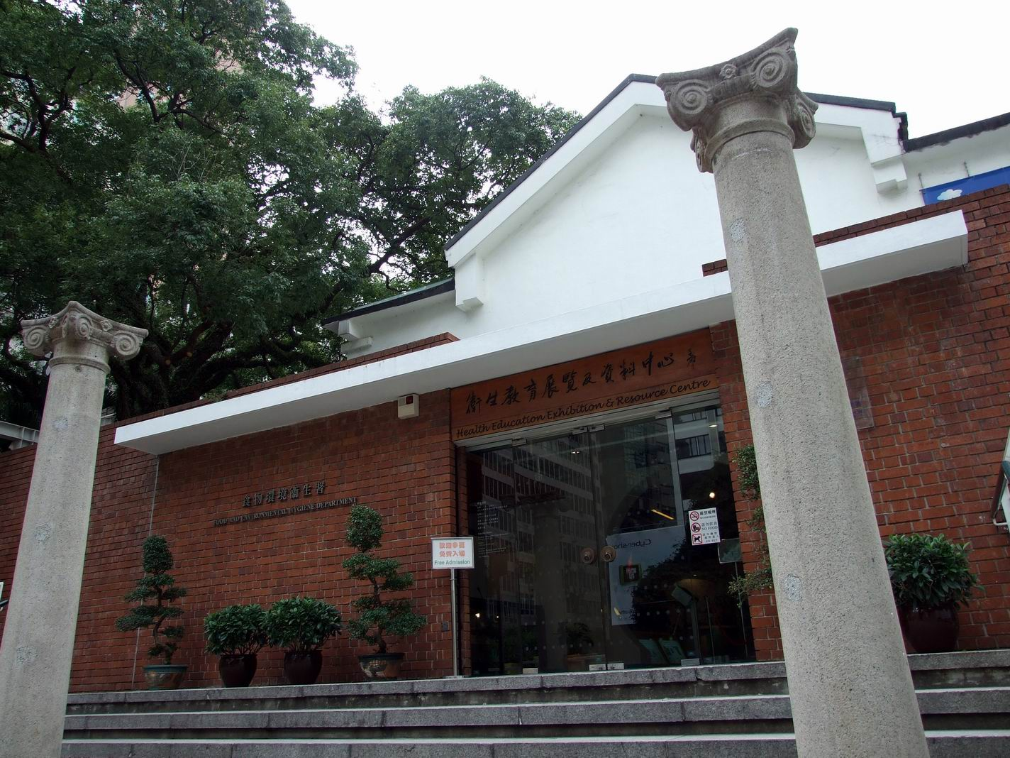 衛生教育展覽及資料中心